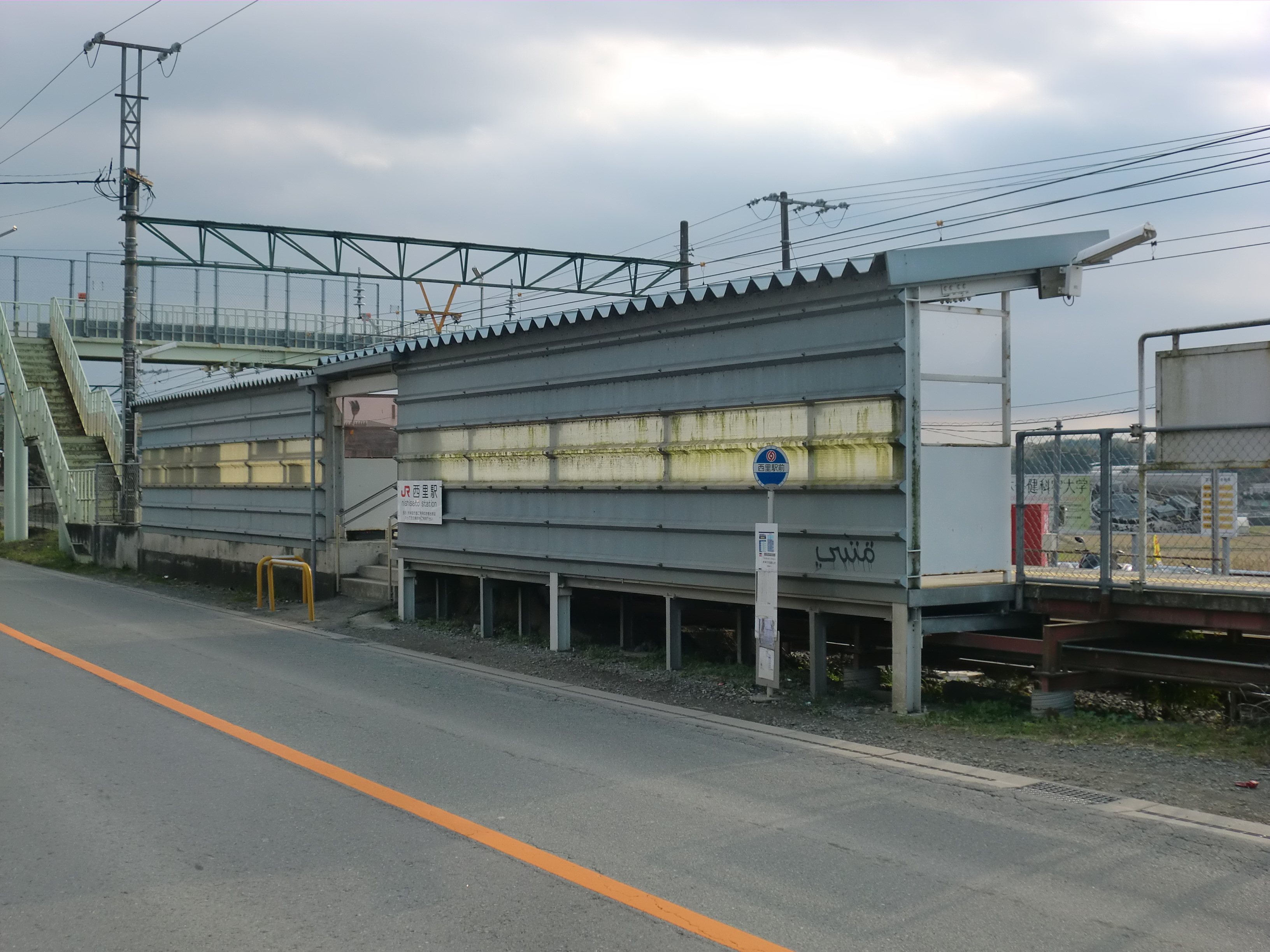 JR鹿児島本線西里（にしさと）駅